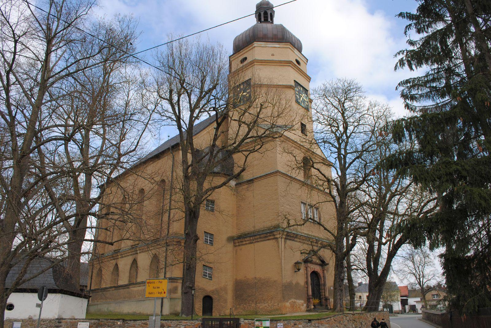 Salvatorkirche in Kürbitz (Vogtland)